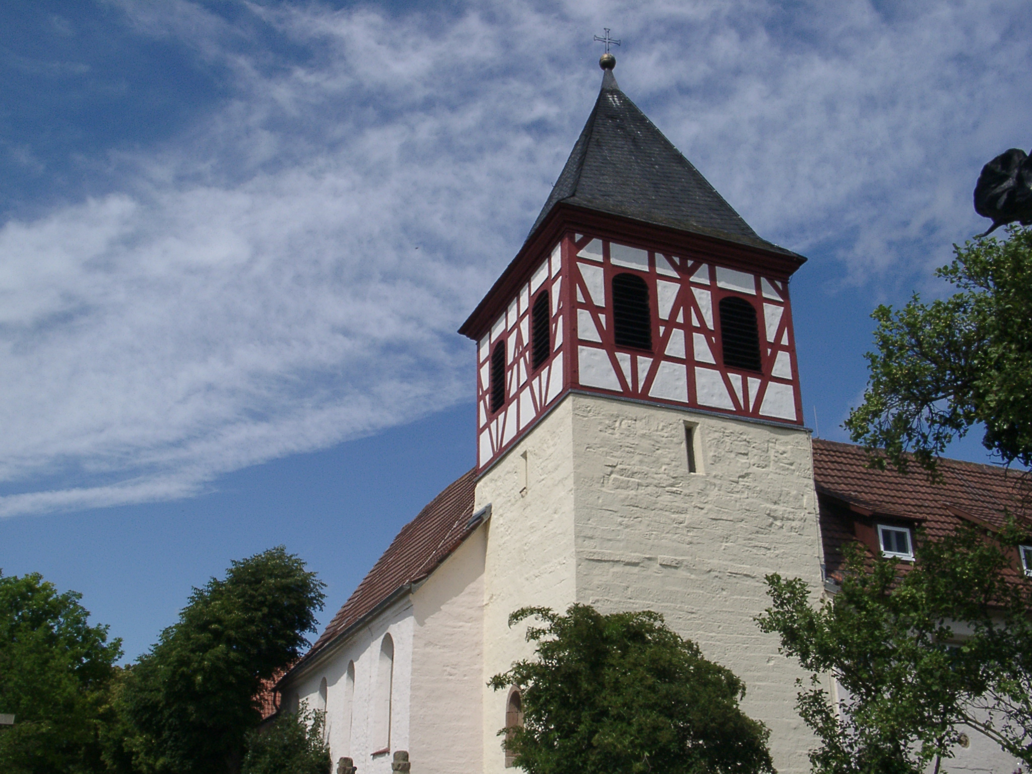 Michaelsberg (Cleebronn)